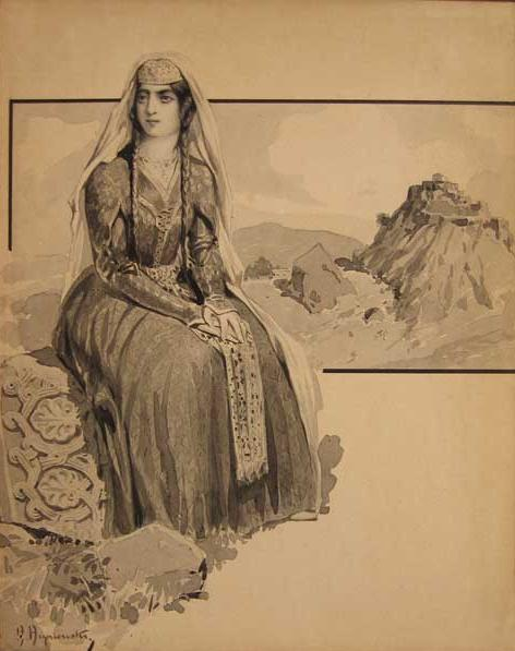 Henryk Hrynievski, Mother of Georgia (ქართლის დედა, "Kartlis Deda").